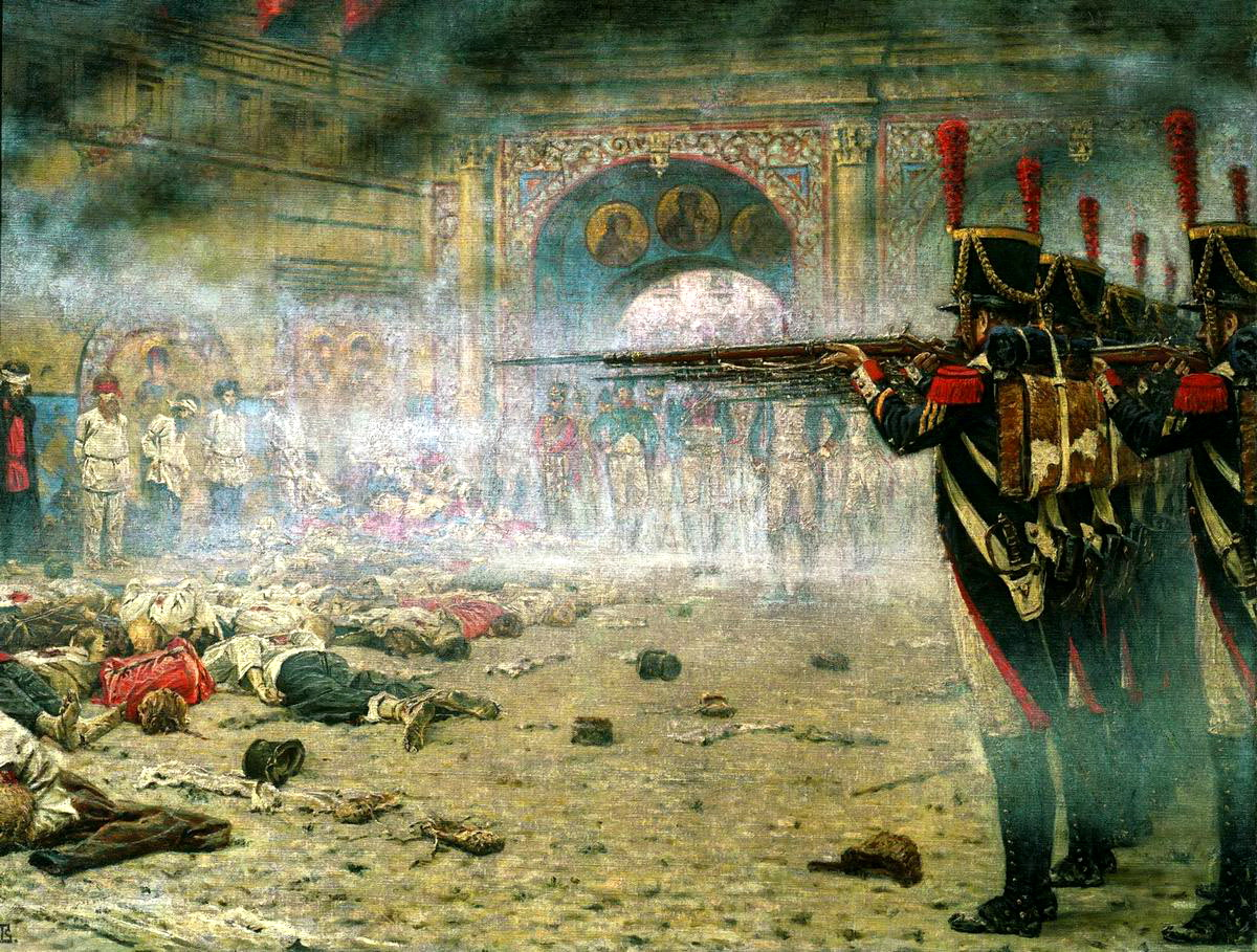 В покоренной Москве ("Поджигатели" или "Расстрел в Кремле")